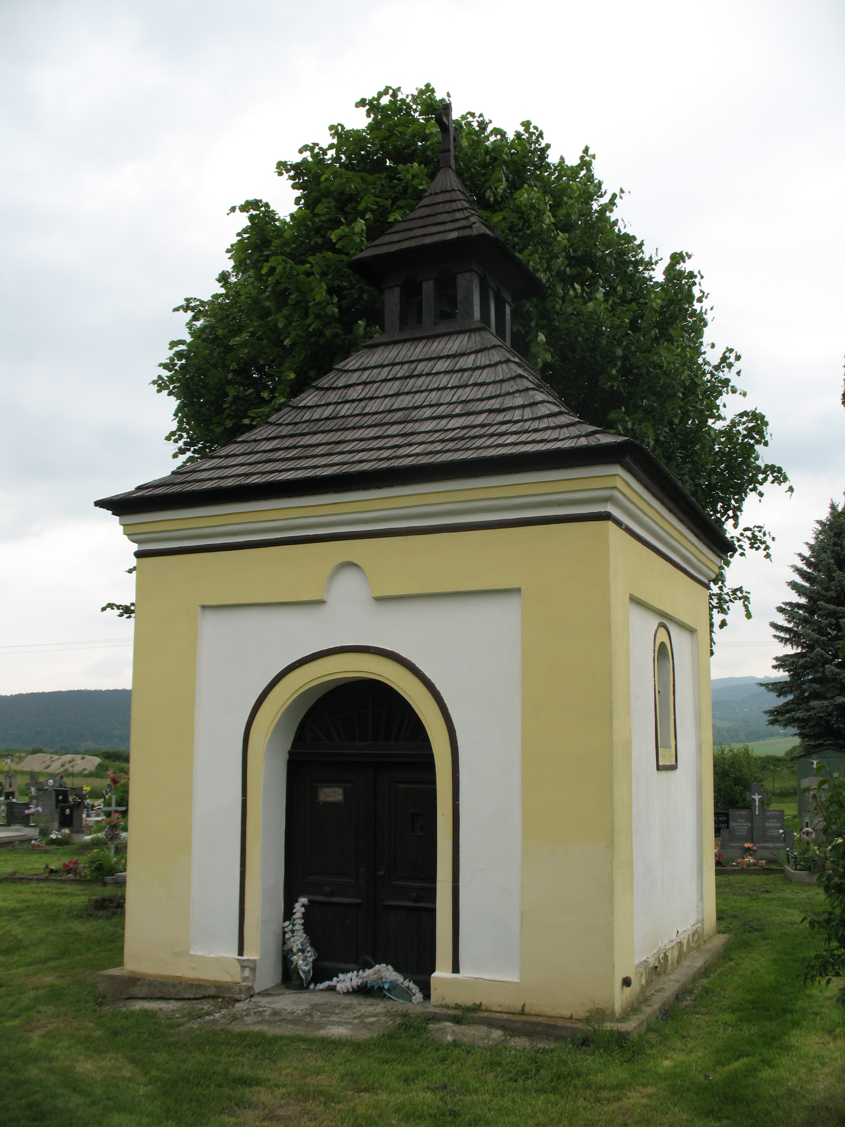 Szalonca